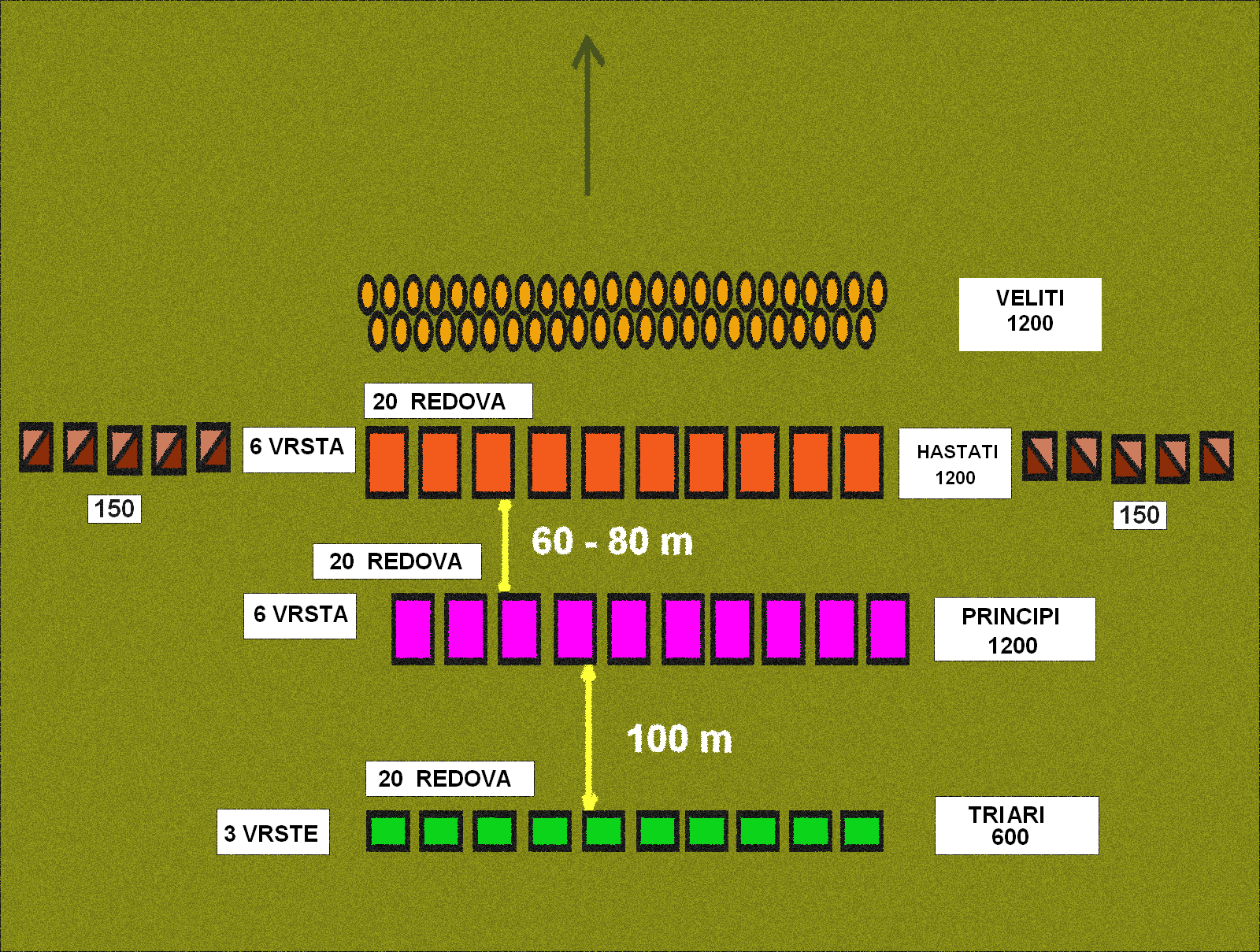 Formacija rimske MANIPULARNE FALANGE (jedna legija). Rimljani su prihvatili grčku falangu, ali su je od drugog punskog rata razvili u efikasniji instrument. “Hastati” su bili najmlađi borici, a “principi” borci srednje starosti. “Triarii” su najstariji borici. Svaka od ovih linija se dijelila na 10 manipula. Manipule hastate i principa imale su po 120 ljudi ( 6 vrsta i 20 redova) a manipule trijara samo po 60 (3 vrste i 20 redova). U manipularnoj falangi legije su postavljane paraleleno. Polibije objašnjava poraz Grka u brbi sa Rimom – razlikom u efikasnosti makedonske i manipularne falange. (Was used: Milittary Enciclopedia – VIZ - Belgrade - 1971. - Part 2, page 742)